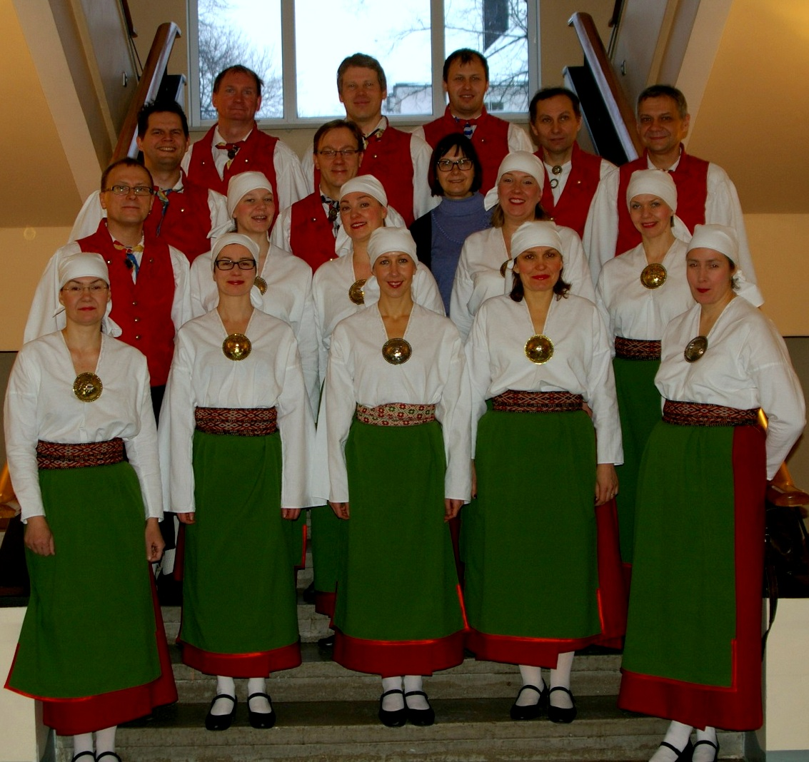 II ülevaatus - ootame tantsimist.